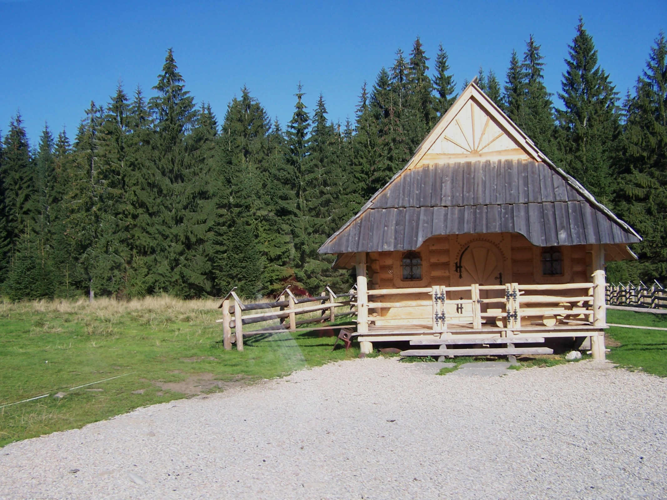 Siwa Polana (Dolina Chochołowska,Tatra Mountains)